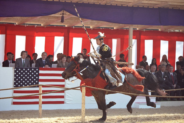 Kyudo Yabusame.